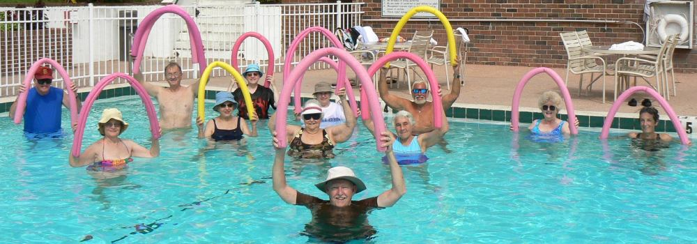 An aqua aerobics class.